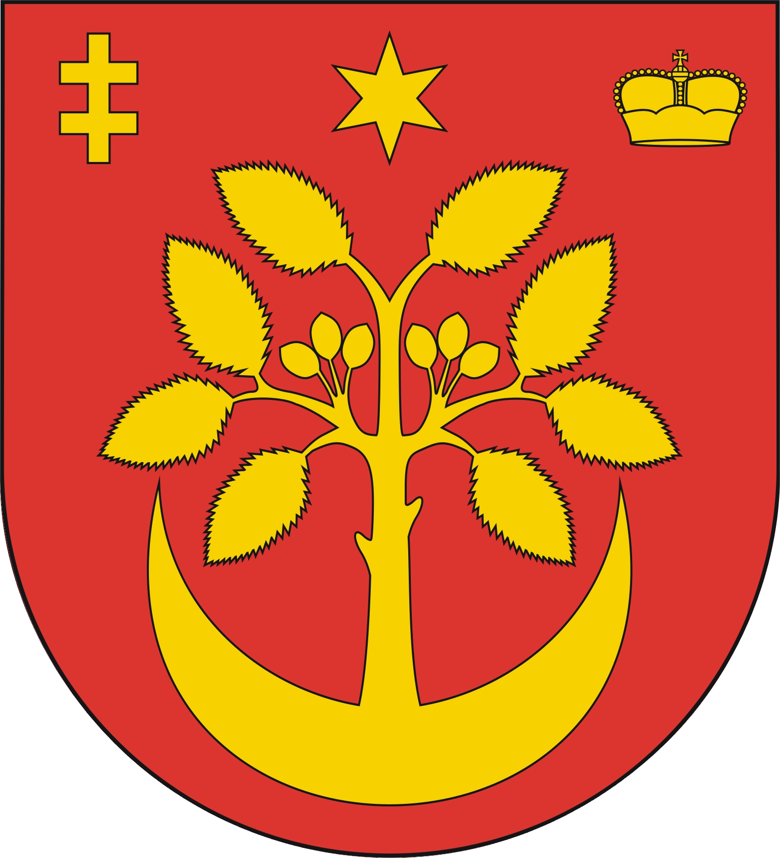 Herb gminy Wiązownica